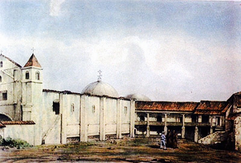 San Jerónimo en 1840.